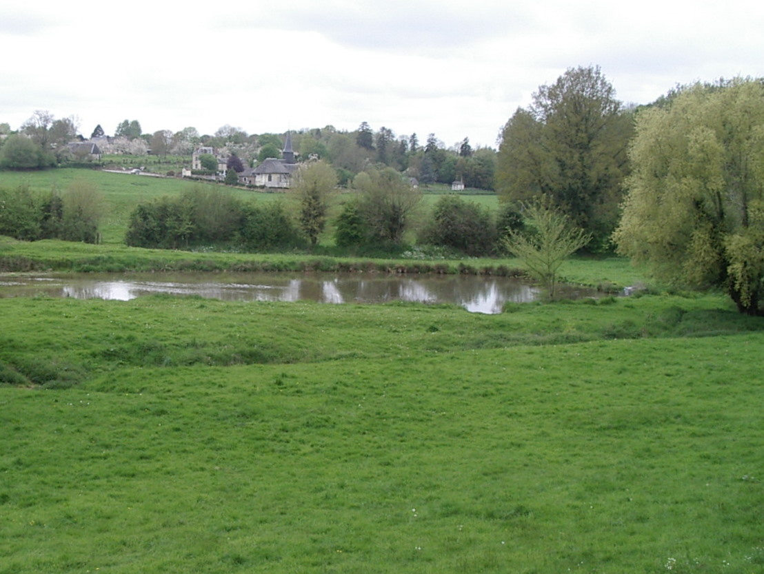 Vue sur Fontaine-la-Louvet (France, Eure)